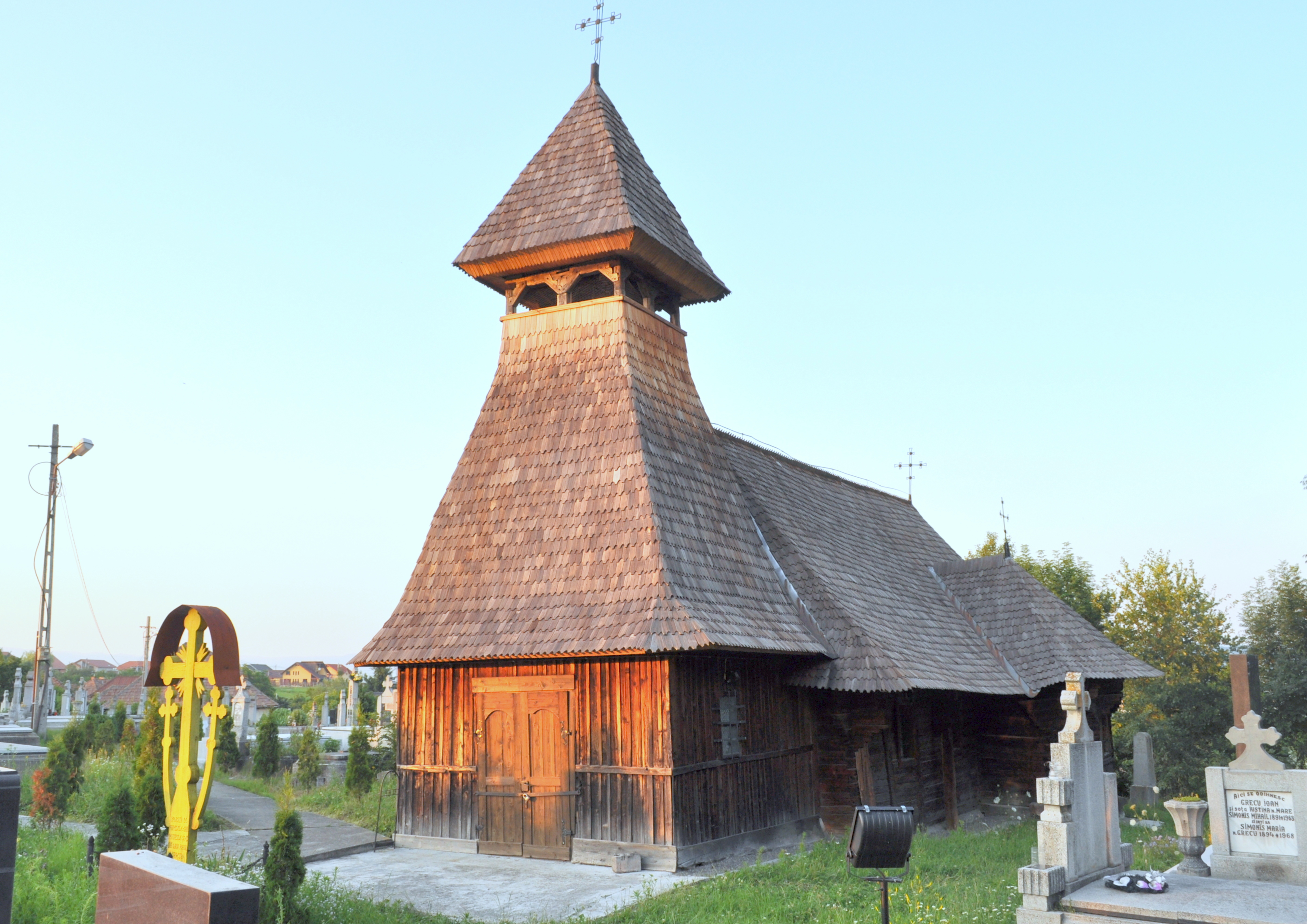 Biserica de lemn „Sfinții Arhangheli” din Reghin, județul Mureș